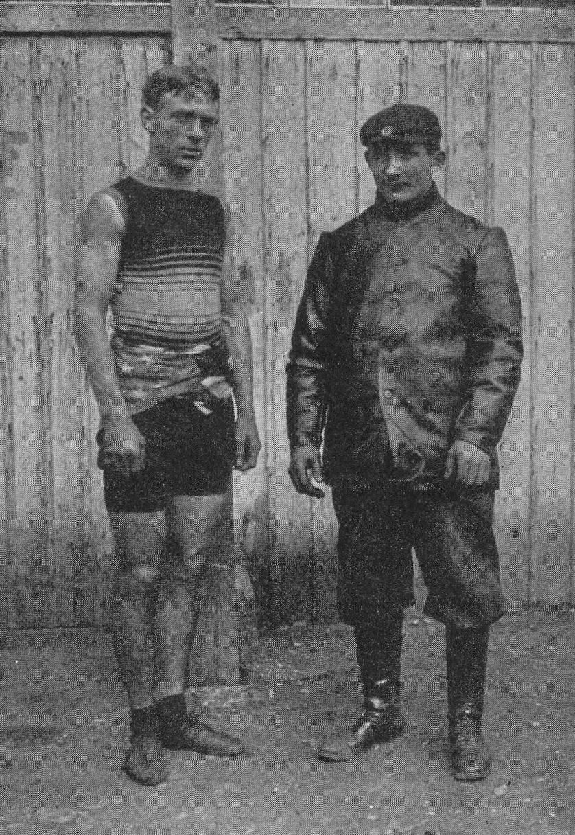 Der US-amerikanische Radrennfahrer Bobby Walthour (l.) mit seinem Schrittmacher Franz Hoffmann